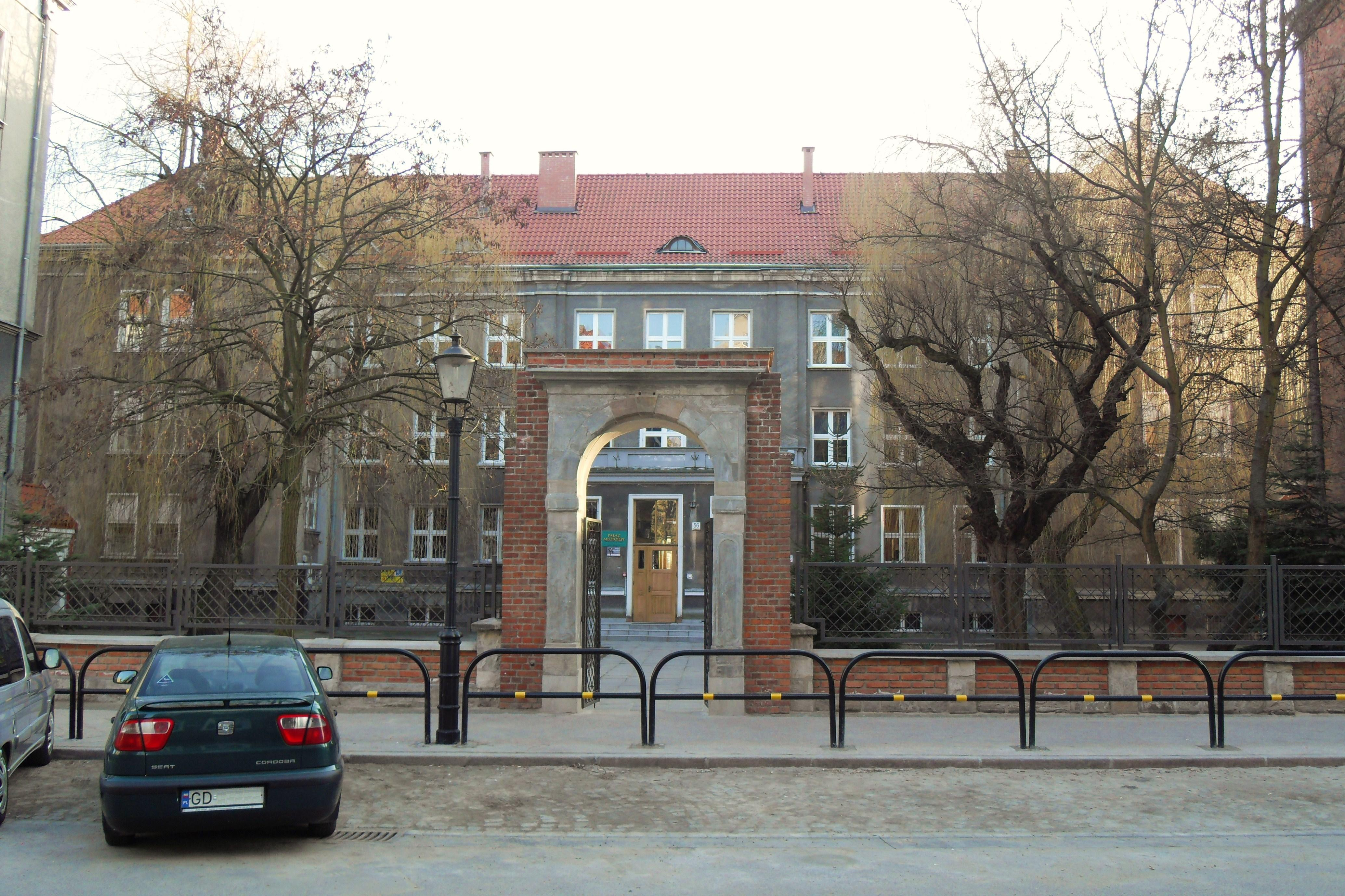 Gdańsk. Ul. Ogarna 56, Pałac Młodzieży.